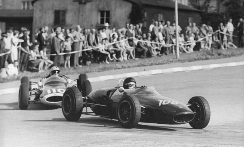 Zentralbild Schaar 14.7.1963 15 Staaten auf dem Schleizer Dreieck am 14.7.63 Zum 30. Male donnerten am Sonntag auf dem Schleizer Dreieck die Motoren. Die älteste Rennstrecke Deutschlands sah an diesem Tag Fahrer aus 15 Ländern am Ablauf und hatte damit ein Rekordergebnis zu verzeichnen. Gleichzeitig stellte das Rennen einen Höhepunkt in der Vorbereitung des in drei Wochen in Leipzig stattfindenden IV. Deutschen Turn- und Sportfestes dar. UBz: Trainingsschnellster am 13.7.63 in der Formel-Junior-Rennwagenklasse war der Belgier C. Franck mit seinem Cooper (3:22, o), der hier seinen schärfsten Rivalen, den Franzosen Offenstadt angreift (vorn).